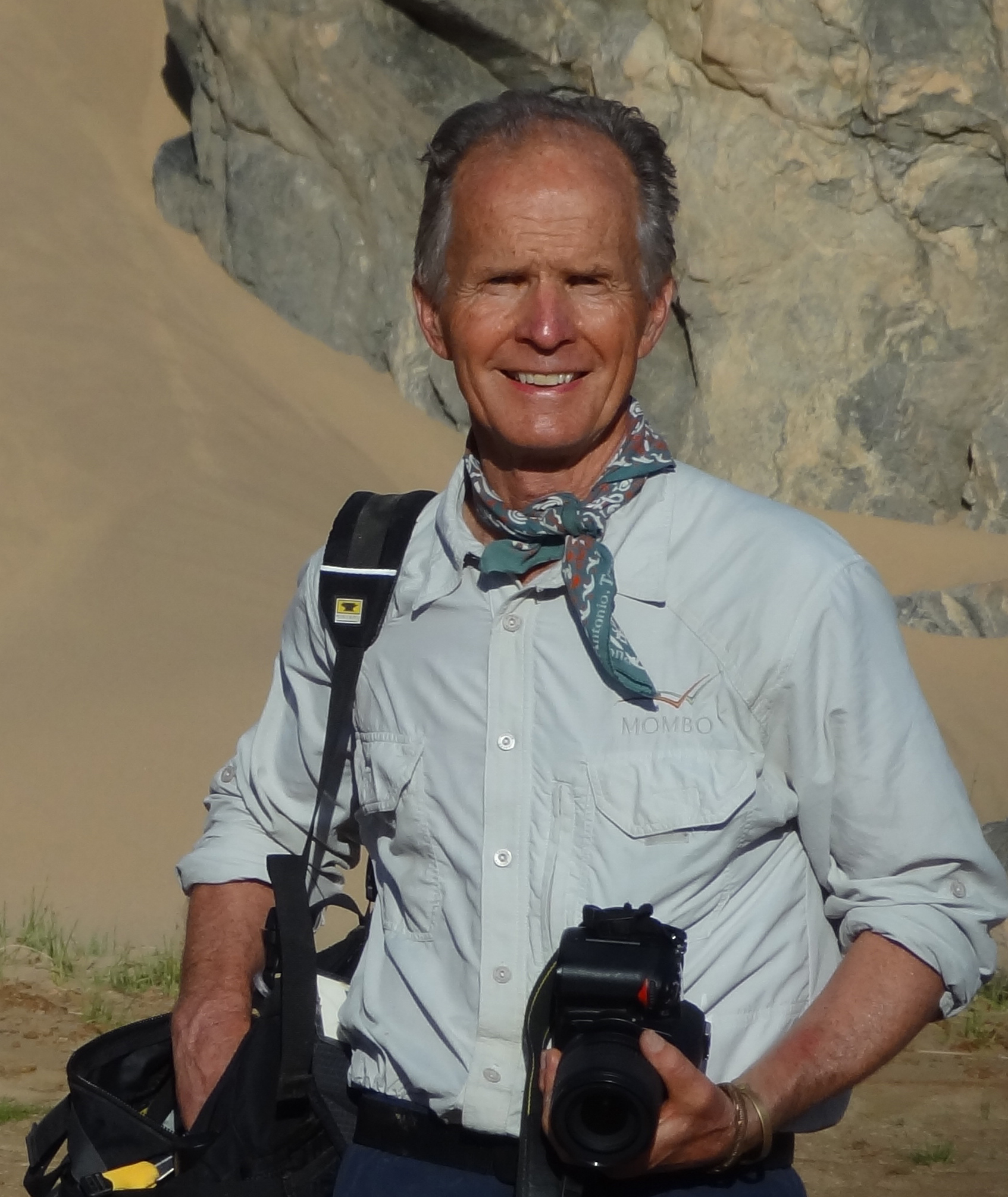 Vance Martin